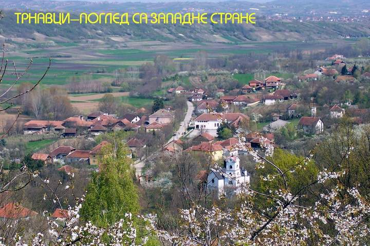 Trnavci-Panorama